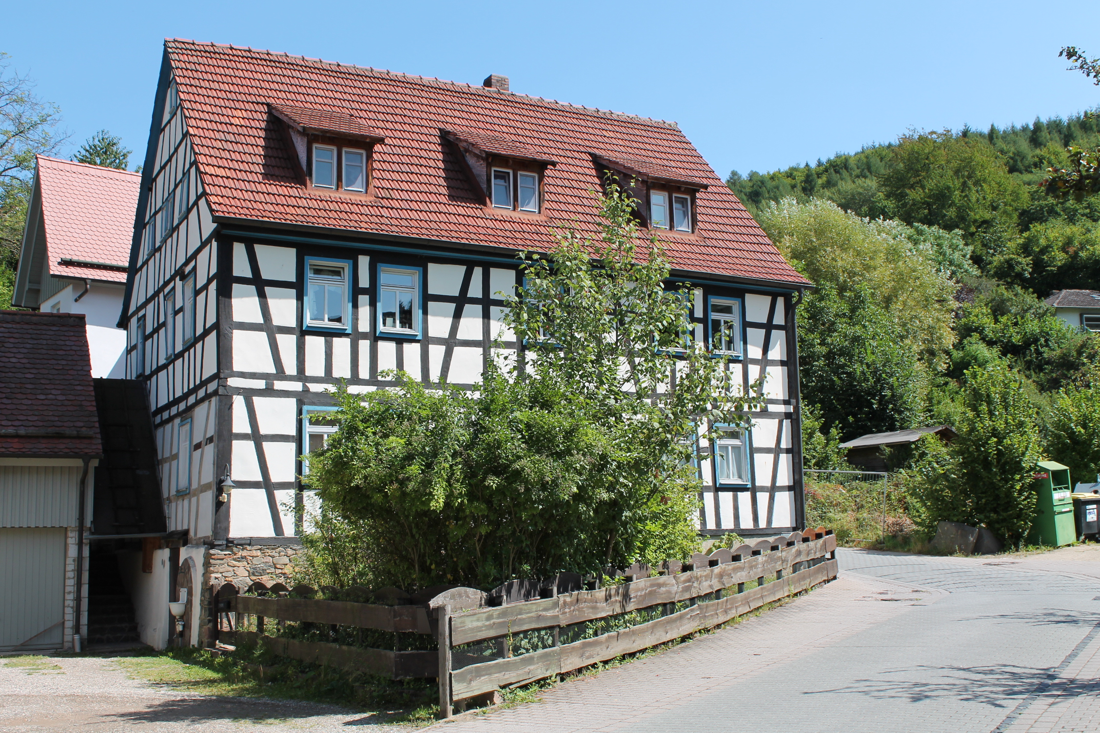 Fachwerkhaus in der Ortsmitte von Stettbach, Seeheim-Jugenheim, Hessen